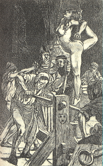 Dessins de Martin van Maële.